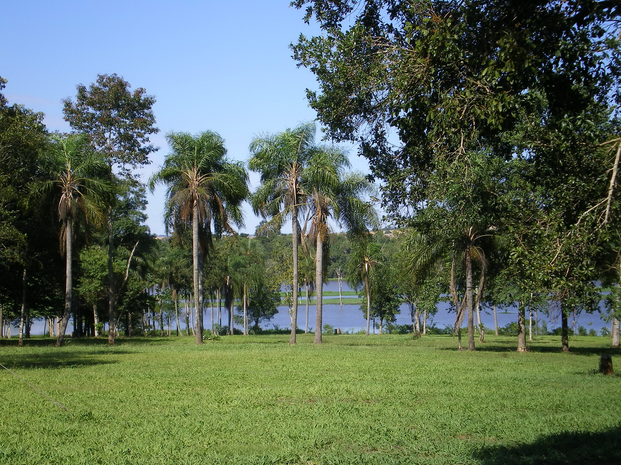 Fotos de los refugios y reservas de Itaipu, tomadas en los años 2007 y 2008 por mí Refugio carapá